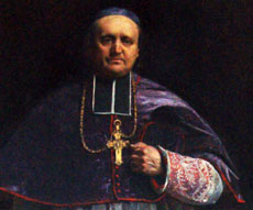 Mgr Félix-Arsène Billiard (évêque de Carcassonne) - Son blason est d’azur à une nacelle d’argent (alias d’or) sur mer du second, avec un saint Pierre comme pilote tenant une rame de sa main dextre et une croix haute de calvaire comme mât de sa main senestre, le tout d’argent. Tableau exposé à Notre-Dame de l'Abbaye, Carcassone. [1]